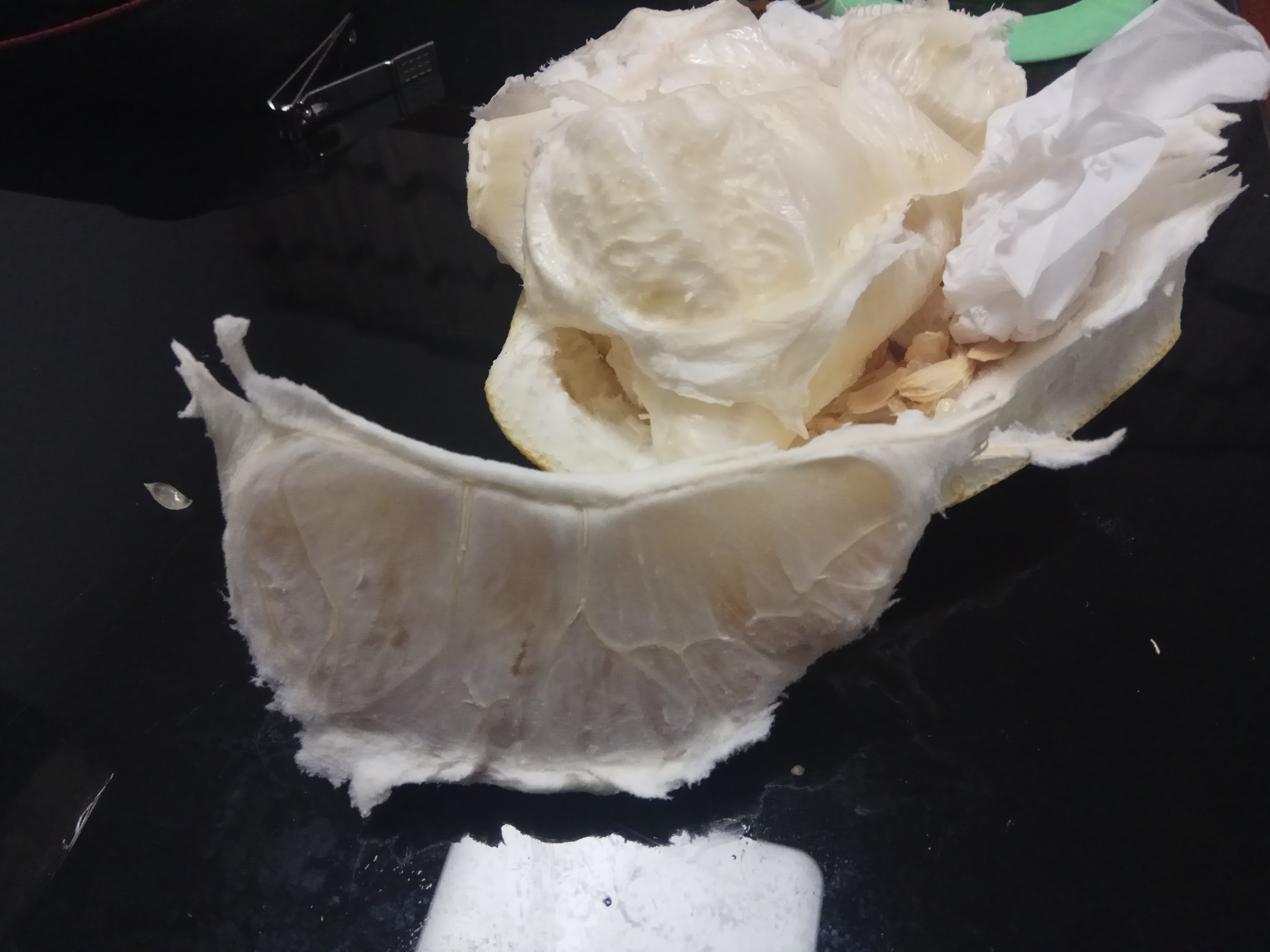 中文（中国大陆）: 一片玉环文旦。